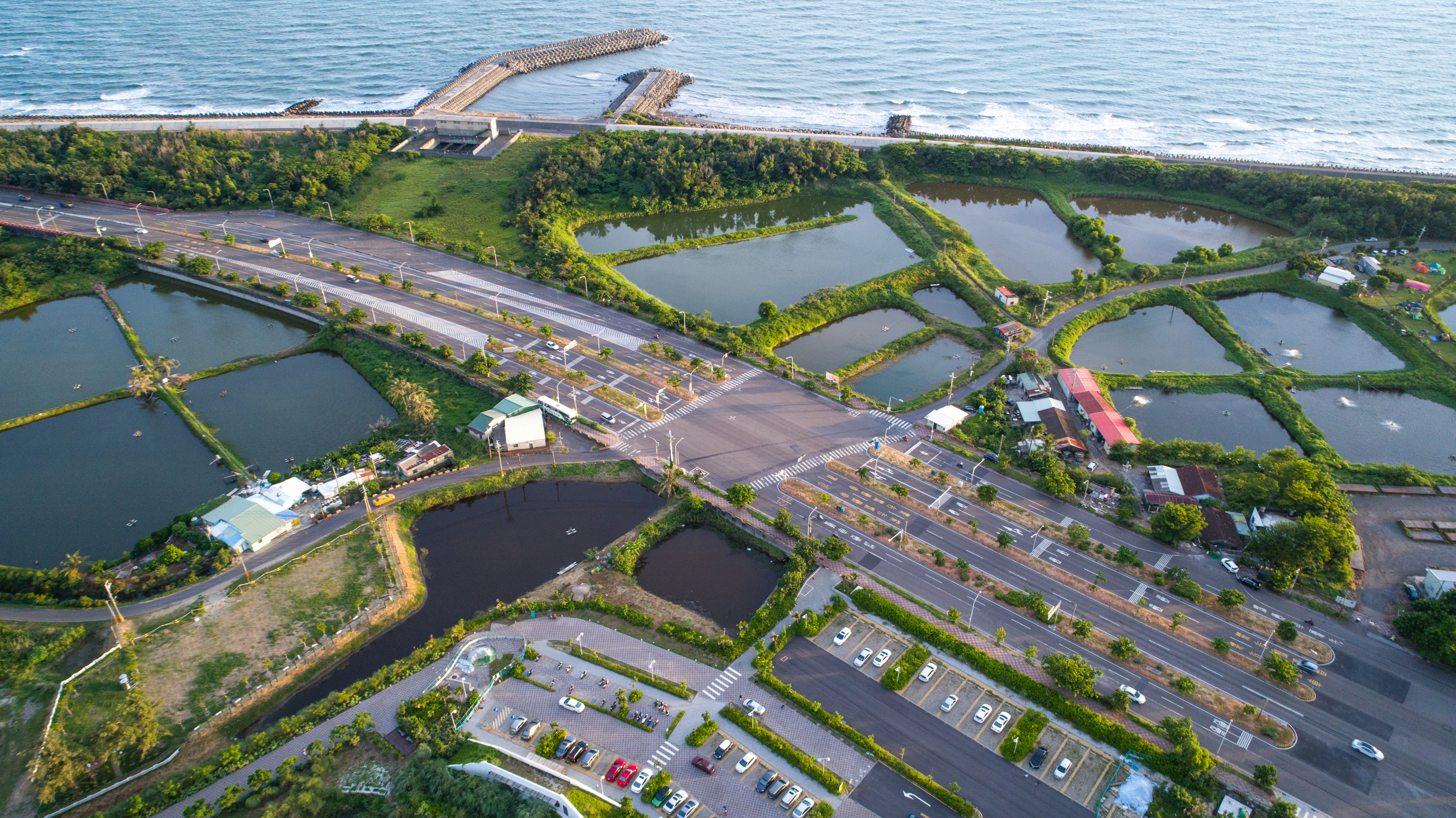 中文（台灣）: 四草大道 ( 一 )